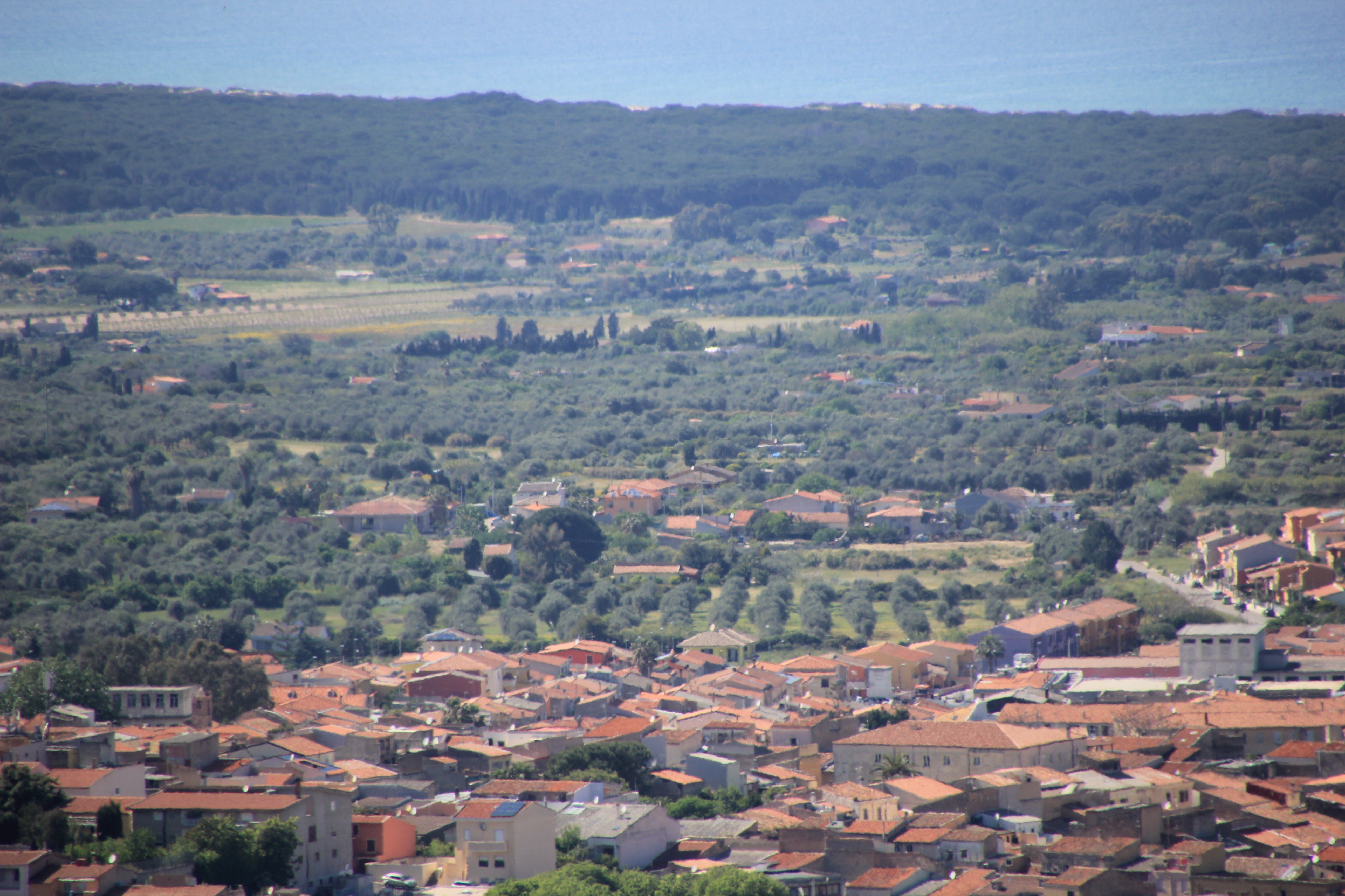 Sorso - Lu Barrili-Monti